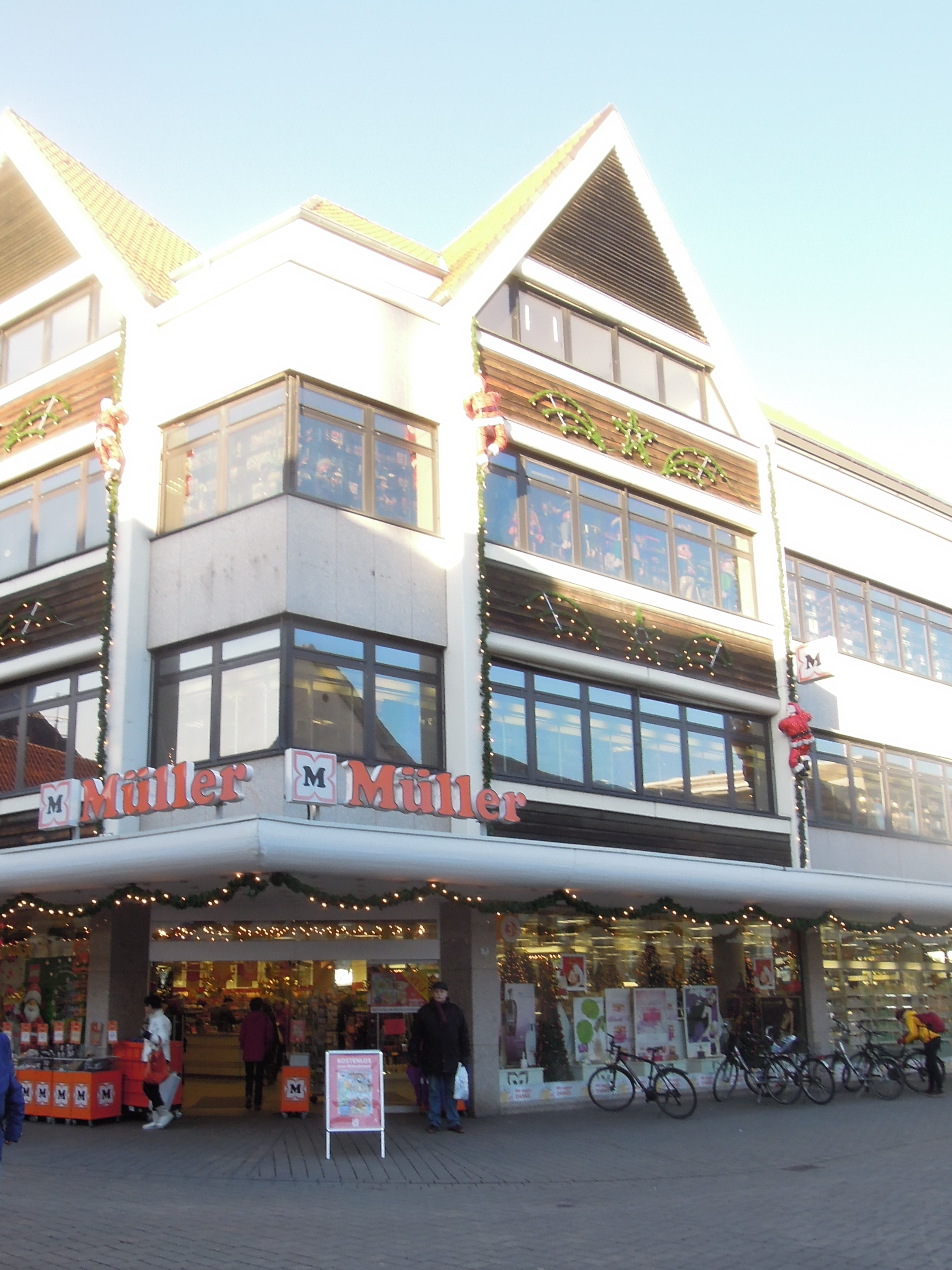 Stolpersteinlage in Soest Brüderstraße 36